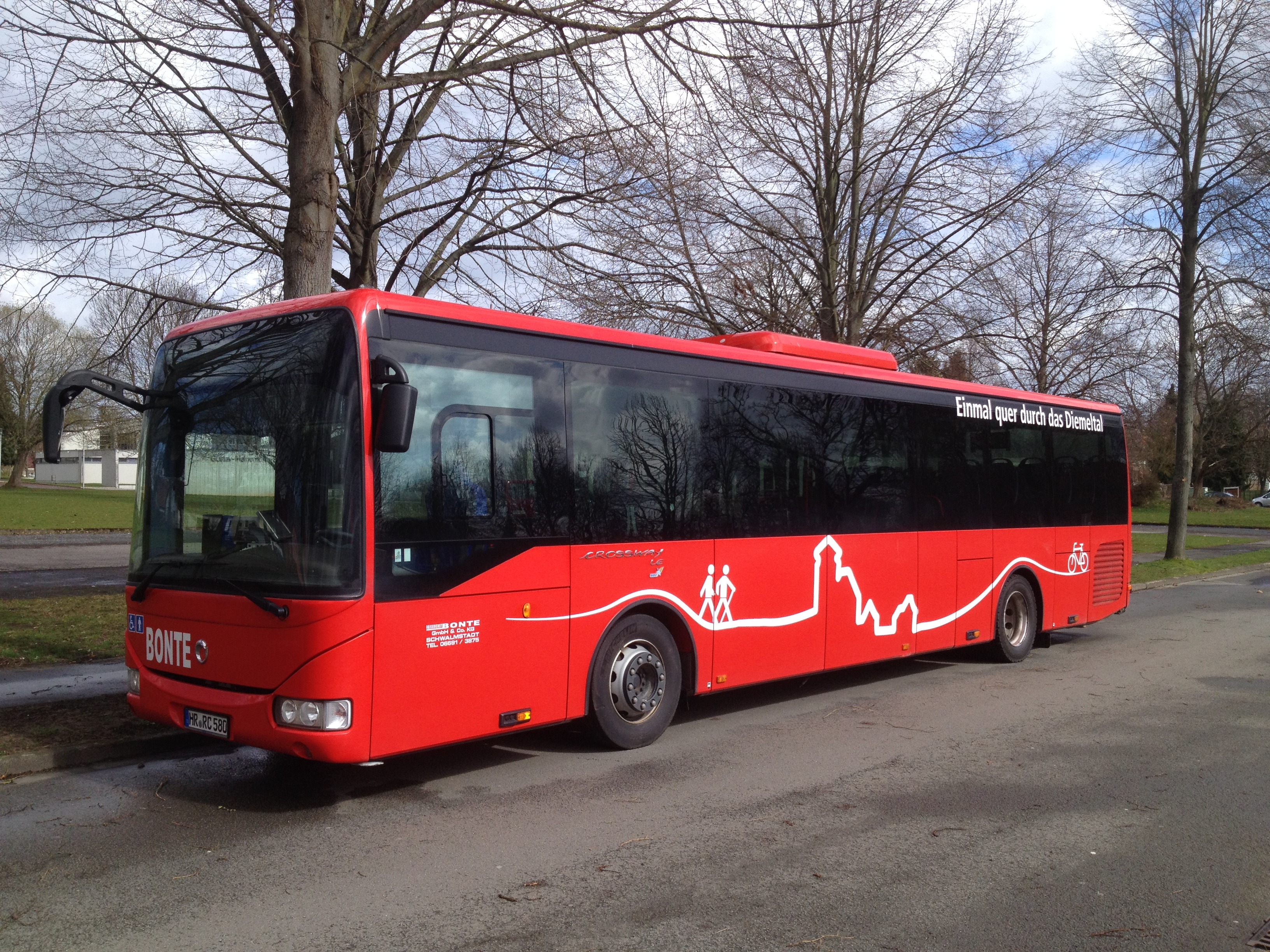 Bus (Irisbus SFR 151 Crossway LE) der Reisedienst Bonte GmbH am ZOB Hofgeismar